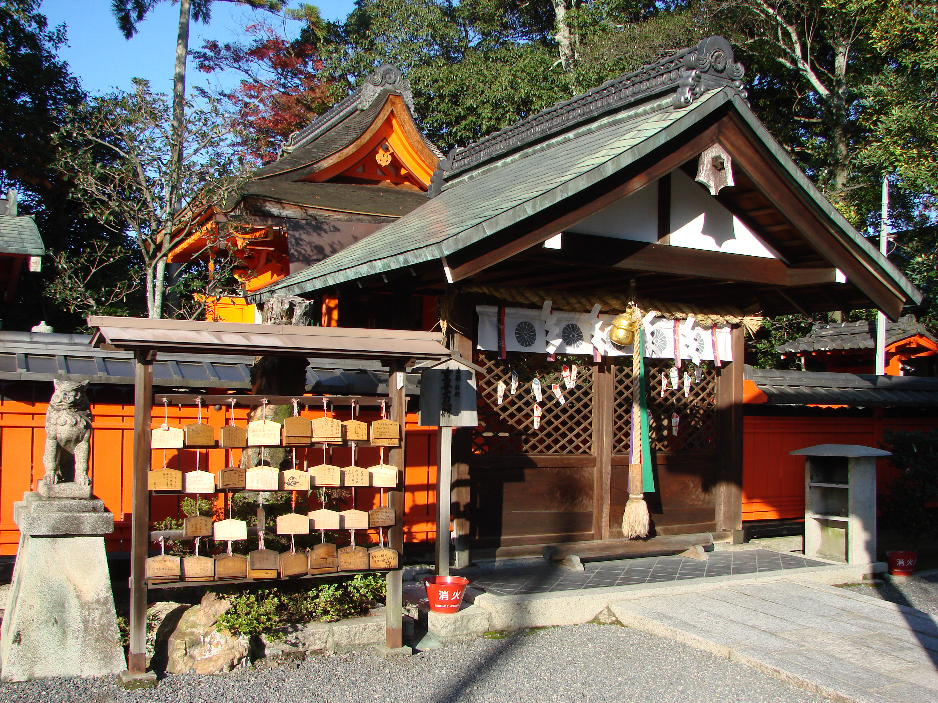 Fukuōji-jinja 福王寺神社, Kyoto